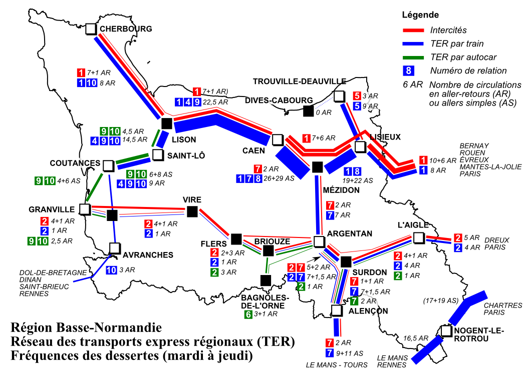 TER Basse-Normandie : fréquences des dessertes les jours types de pleine semaine (mardi, mercredi, jeudi), horaire annuel 2012.